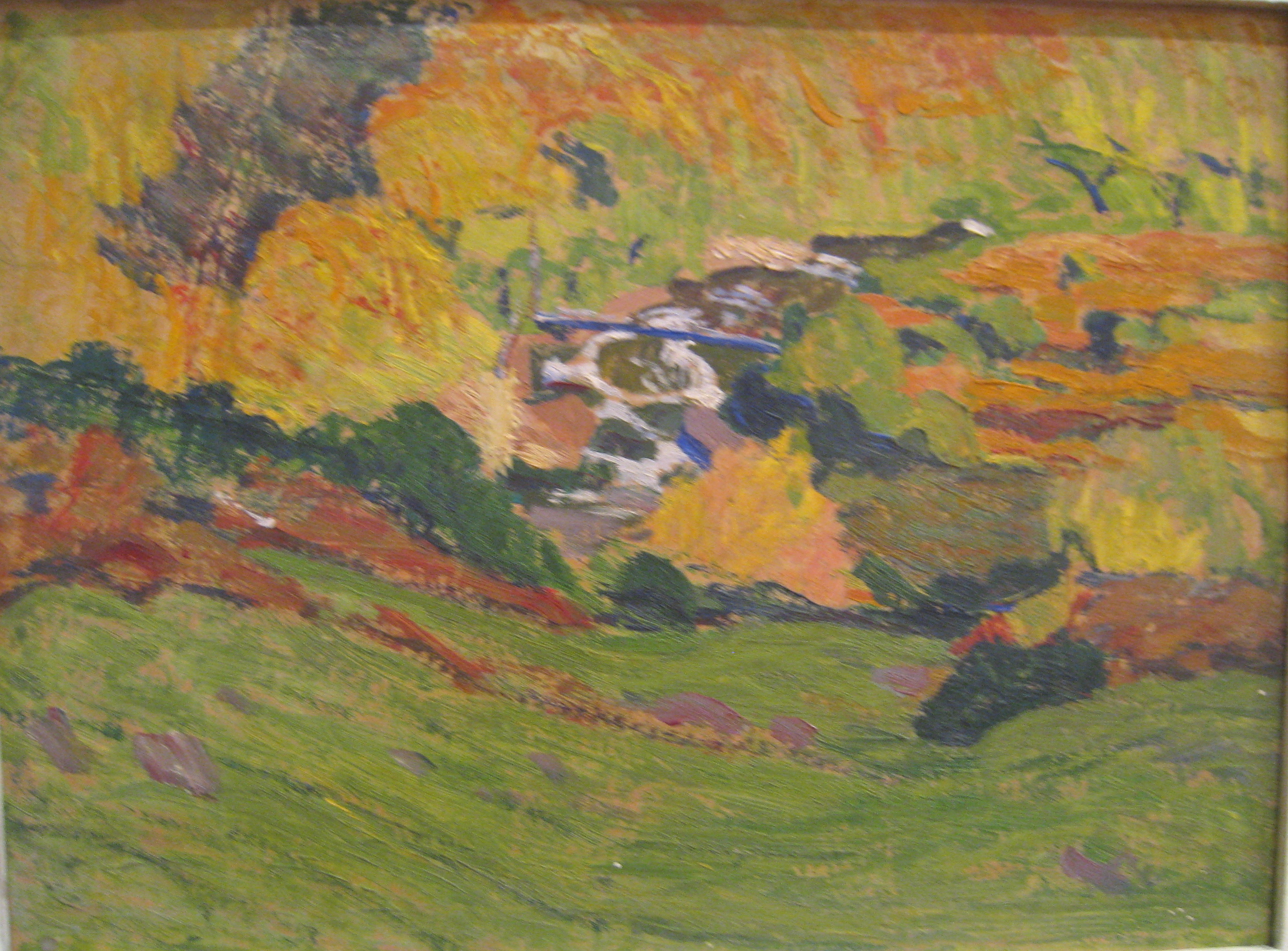 Öl auf Karton